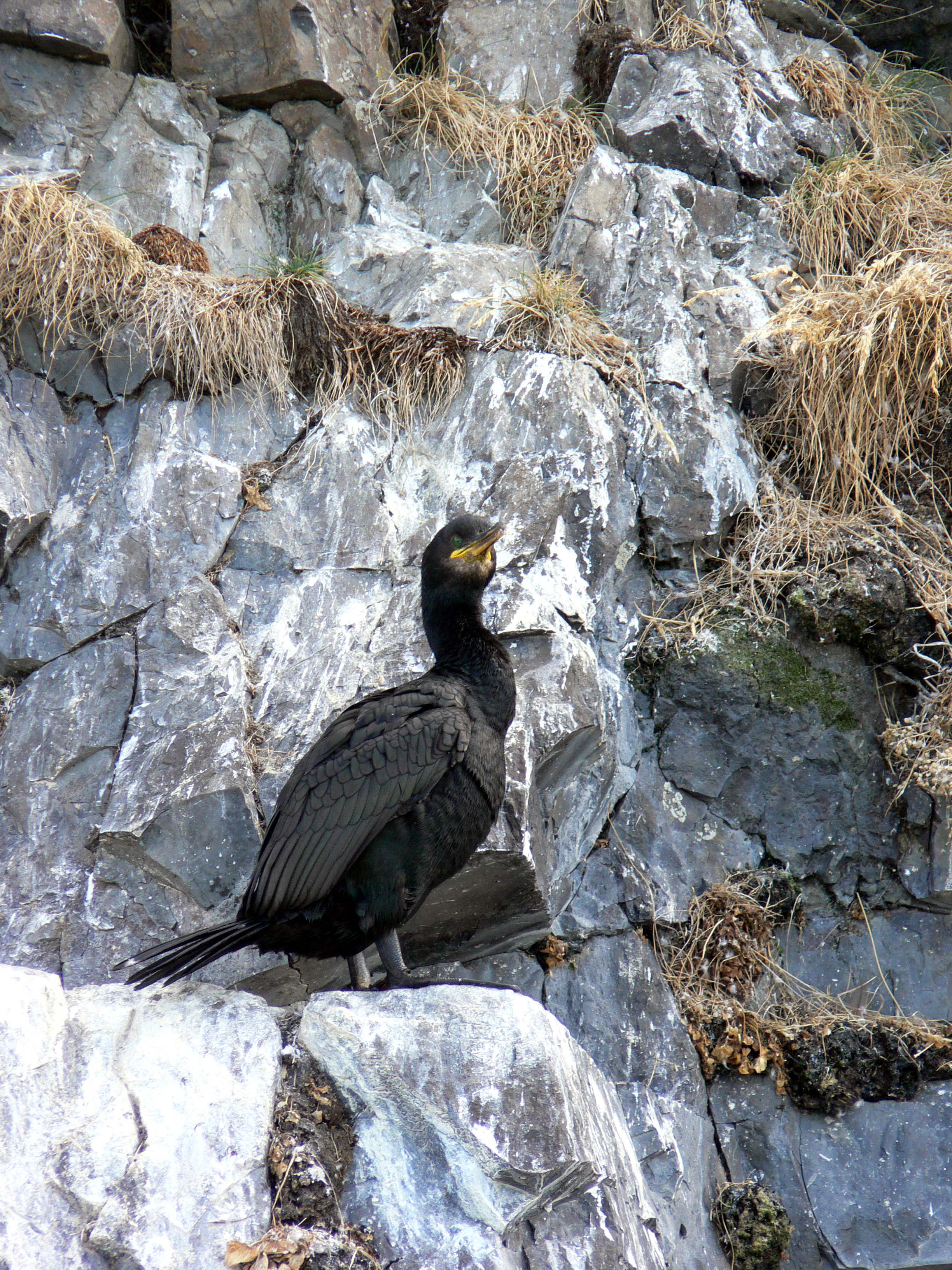 Krähenscharbe auf einer Insel im Breiðafjörður.